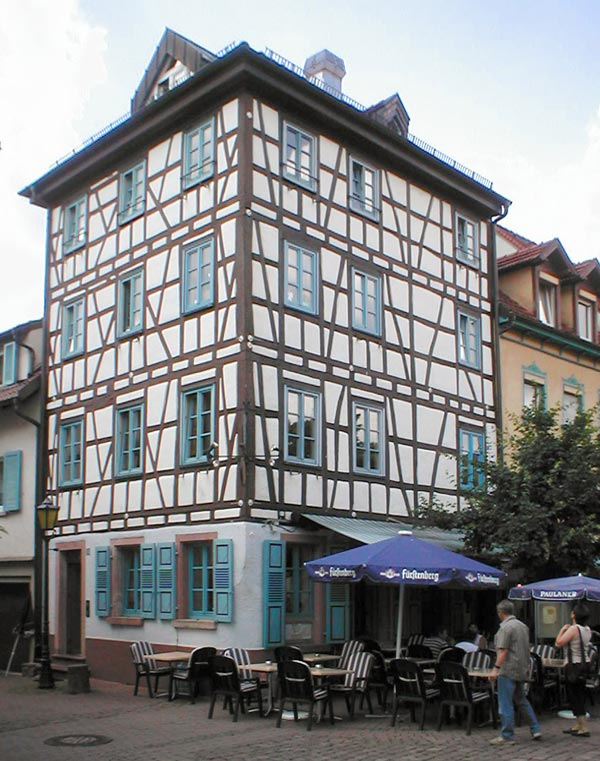 Hist. Fachwerkgebäude beim Badhaus in Eberbach/Neckar